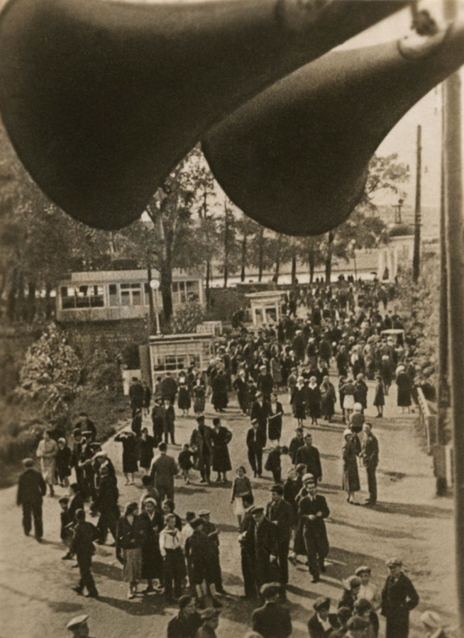 1939. Аллея у набережной. Центральный парк культуры и отдыха им. Горького, Москва